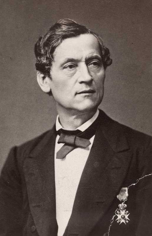 Johan Didrik Behrens, ca. 1880-1890